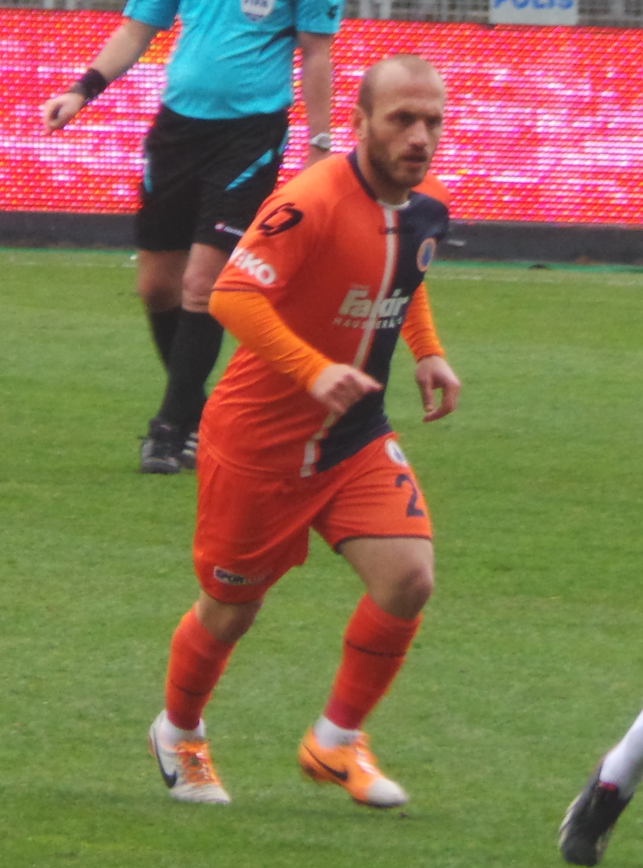 Alaattin Tosun